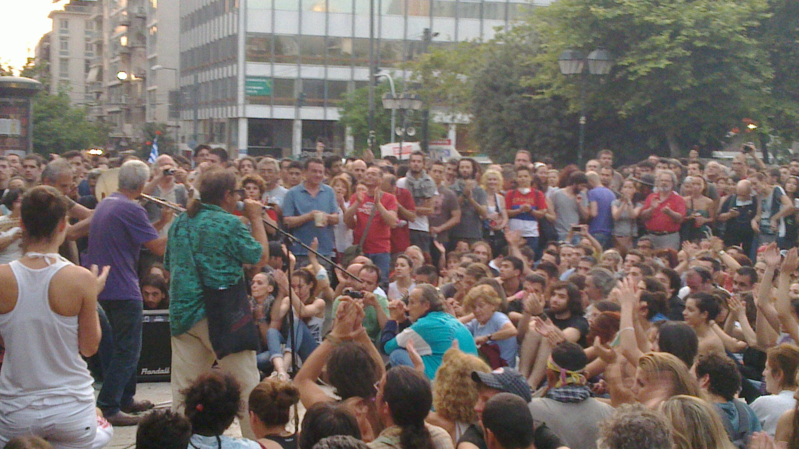 Οι Αέρα Πατέρα στο Σύνταγμα στις 15 Ιουνίου 2011.